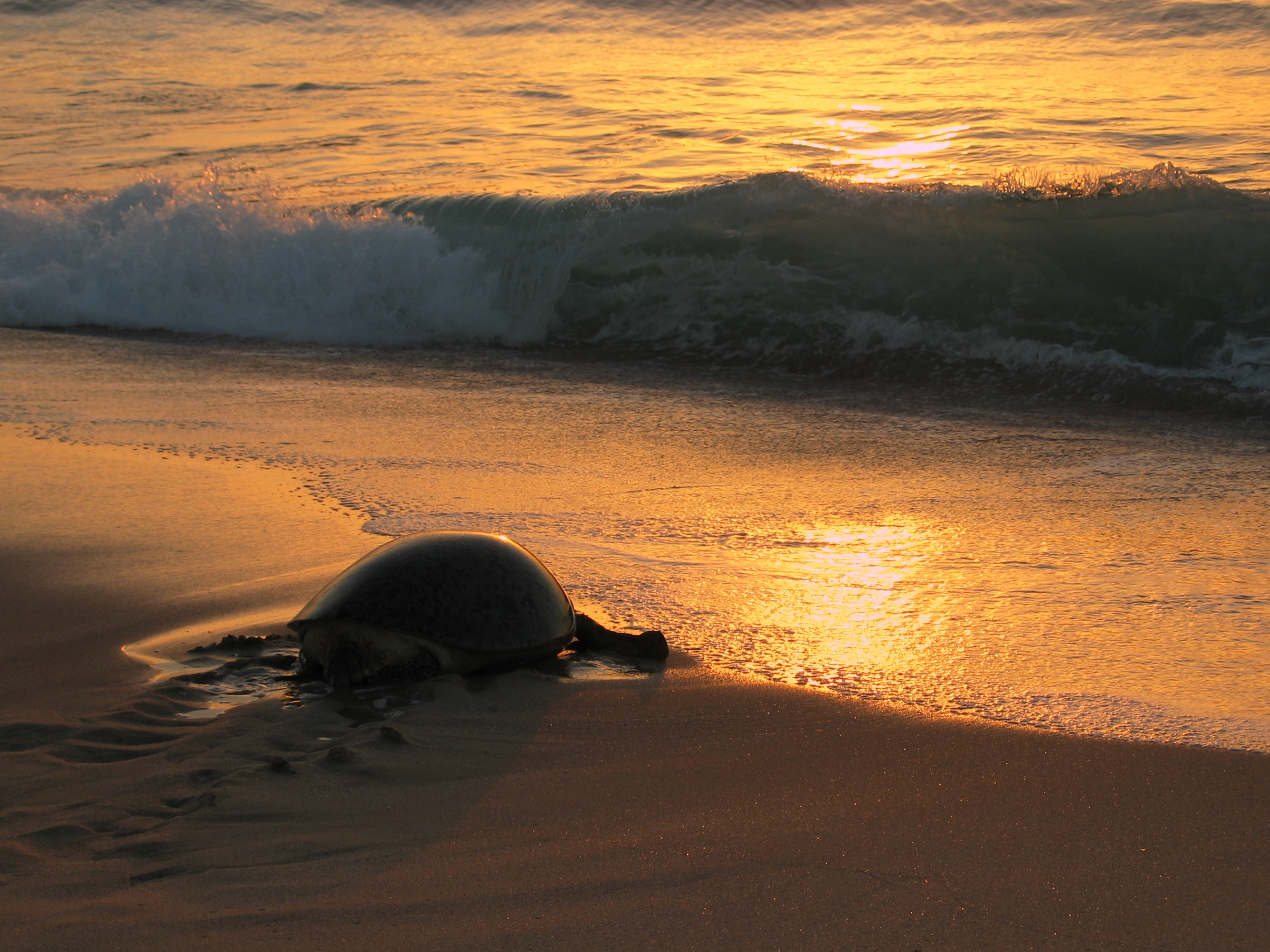 Meeresschildkröte am Morgen nach Eiablage auf dem Weg zurück ins Meer bei Oman